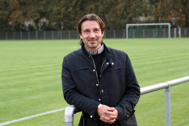 Reinhold Breu (Nebenplatz, Moselstadion Trier)